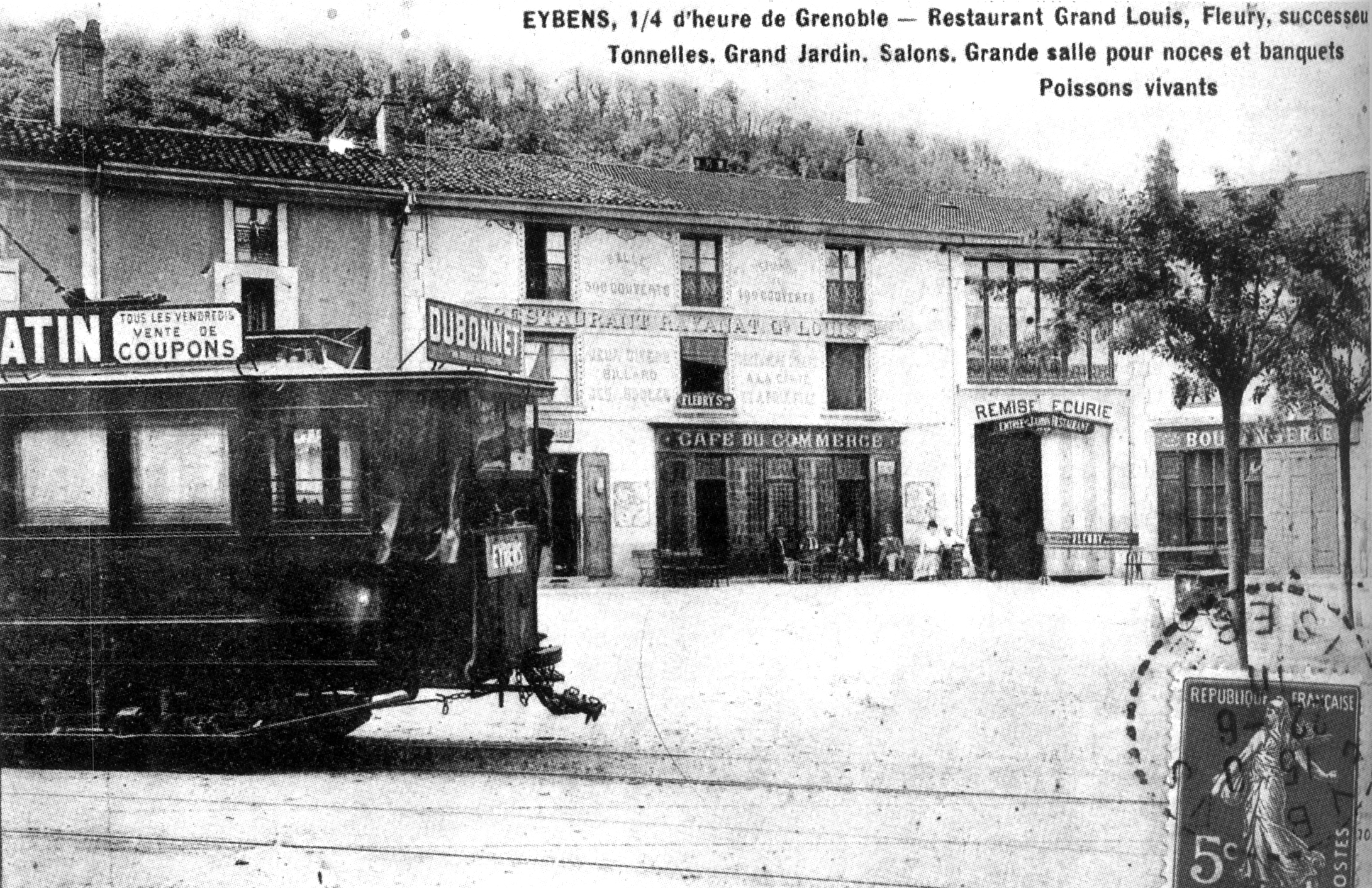 Eybens en 1911. Carte postale